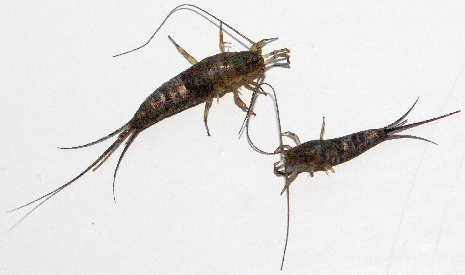 Steinsprett Petrobius brevistylis er en vanlig norsk art.Template:Byline